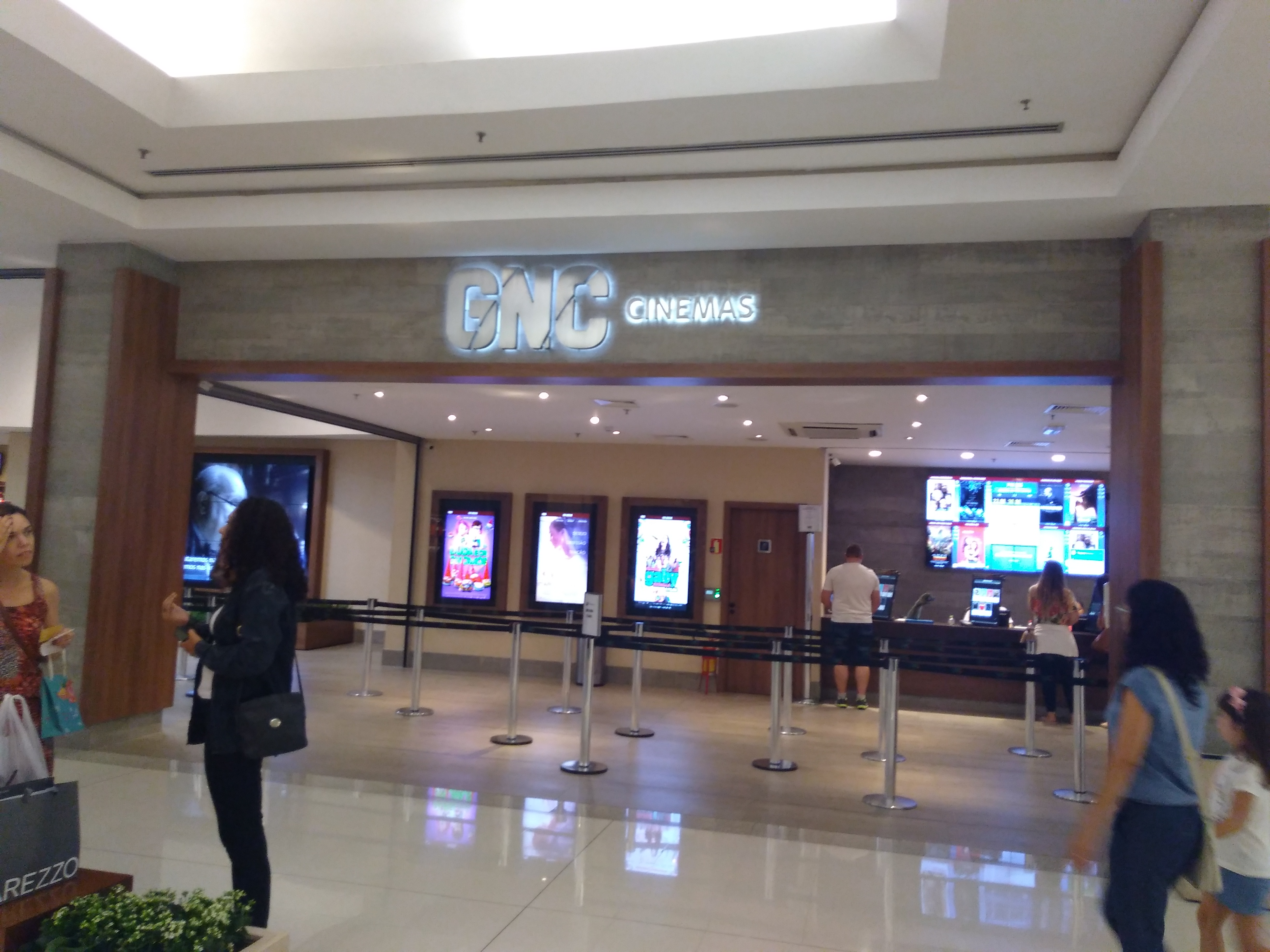 Vista frontal do GNC Cinemas Iguatemi de Porto Alegre, RS